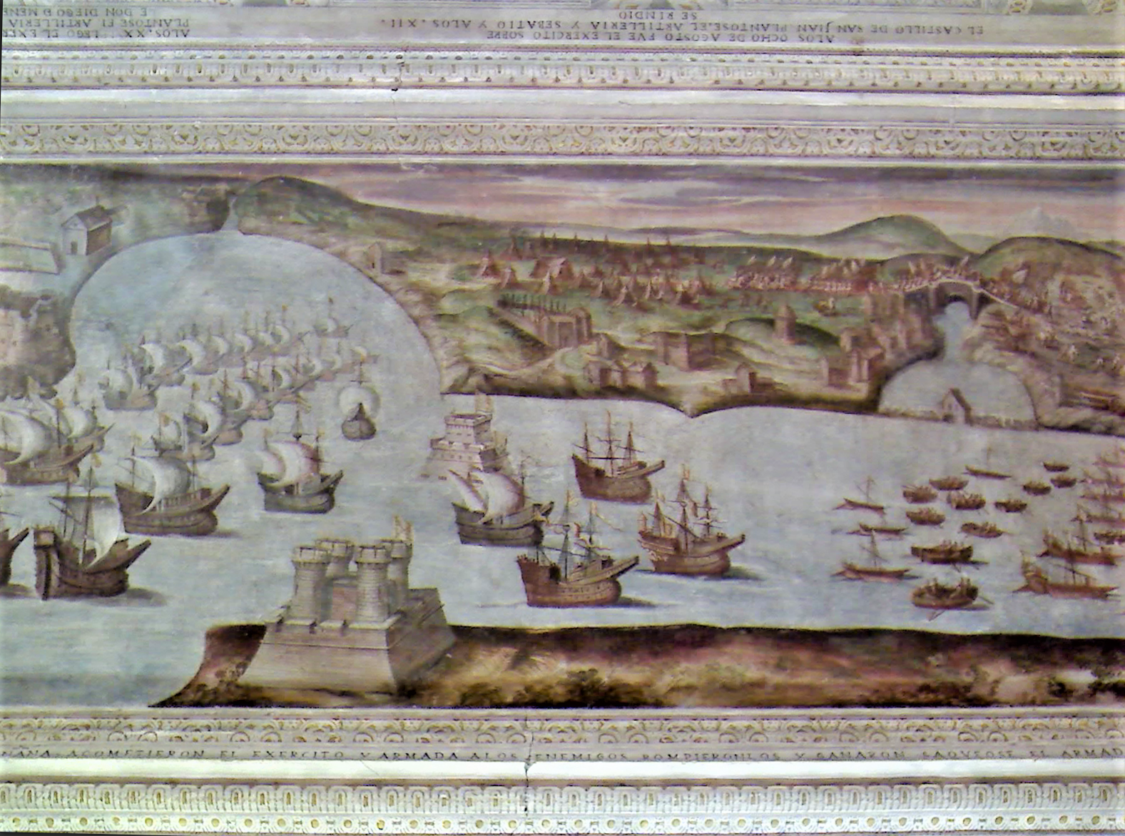 Fresco del siglo XVI de pintores manieristas italianos (los Perola) en el Palacio del Marqués de Santa Cruz en el Viso del Marqués (Provincia de Ciudad Real - España), cuenta la toma del Castillo de San Juan por don Álvaro de Bazán.